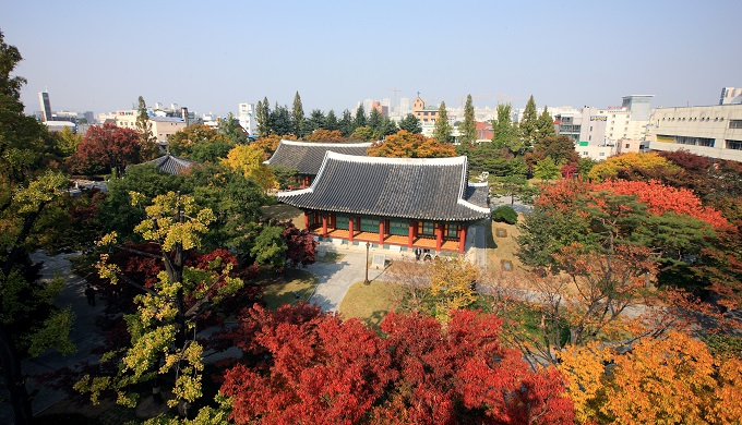 대구광역시 경상감영